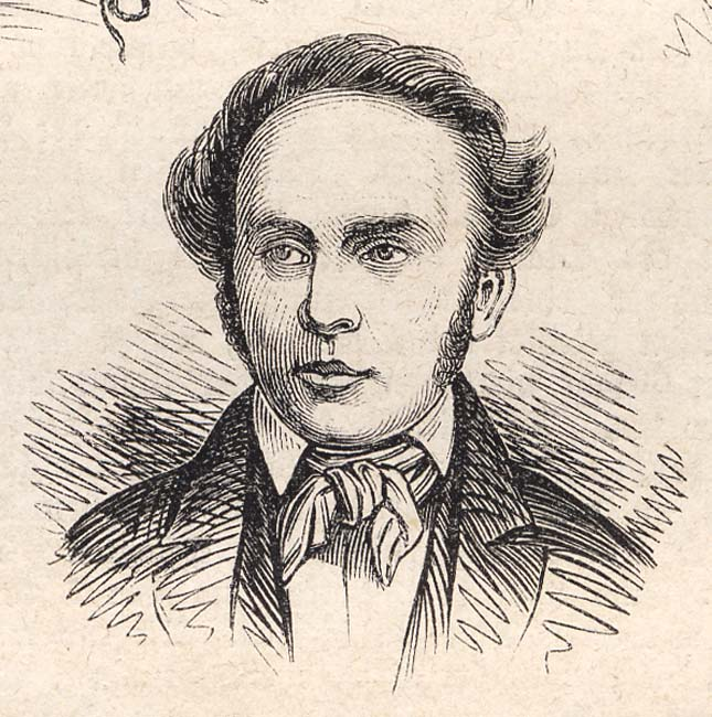 Goswin Krackrügge (1803-1811)